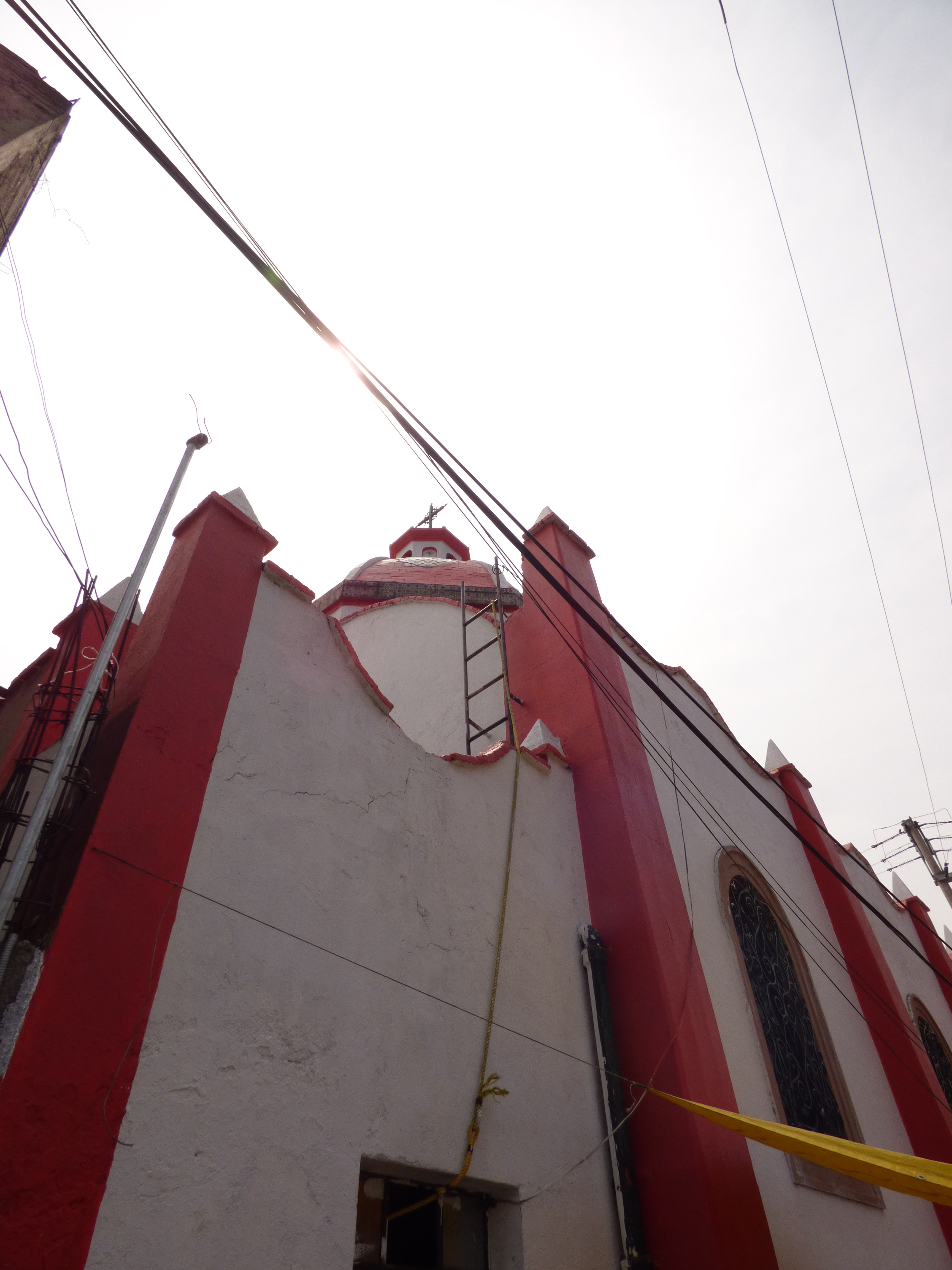 Imagen de la cúpula de San Lorenzo color blanco y rojo al estilo de los pueblos típicos, en el fondo el cableado eléctrico, tomada desde la Calle Adelaida.Barrio de San Lorenzo, Delegación Xochimilco, Ciudad de México.